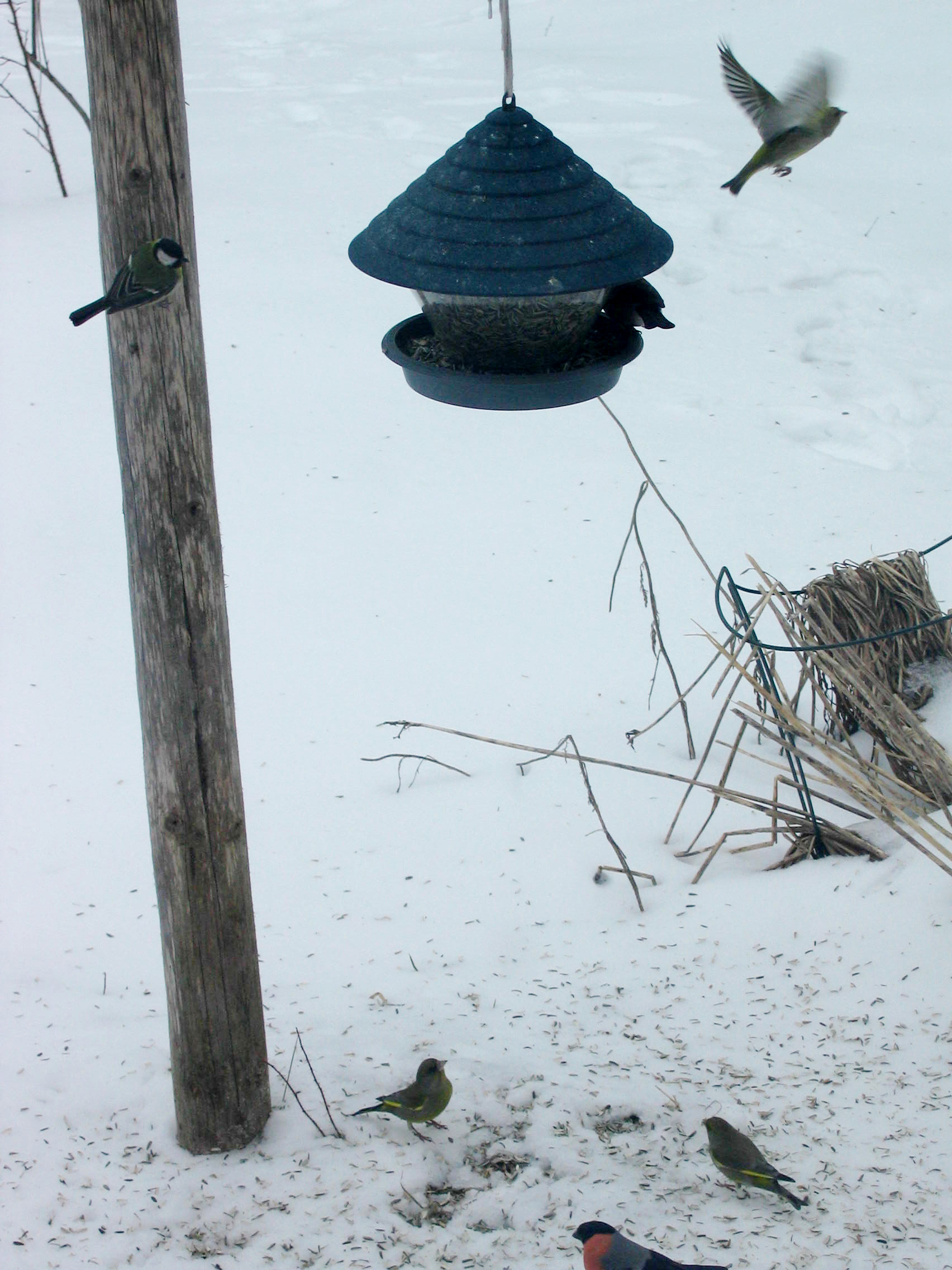 Birds eating seeds in Utajärvi, Finland.